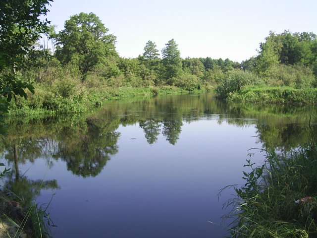 Фота Рака Пціч у Акцябрскім раёне